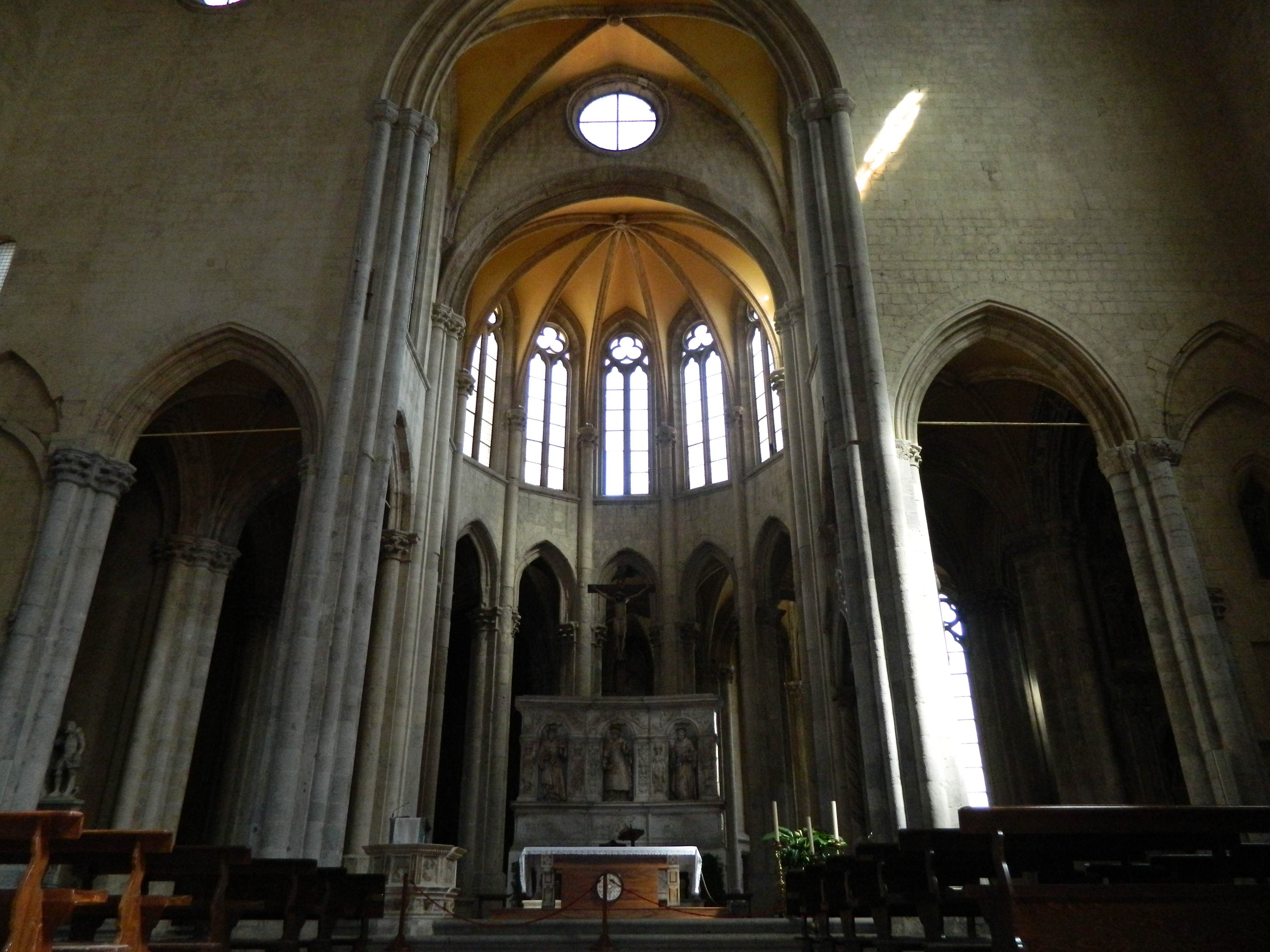 Basilica di San Lorenzo Maggiore (Napoli) - L'abside in gotico francese